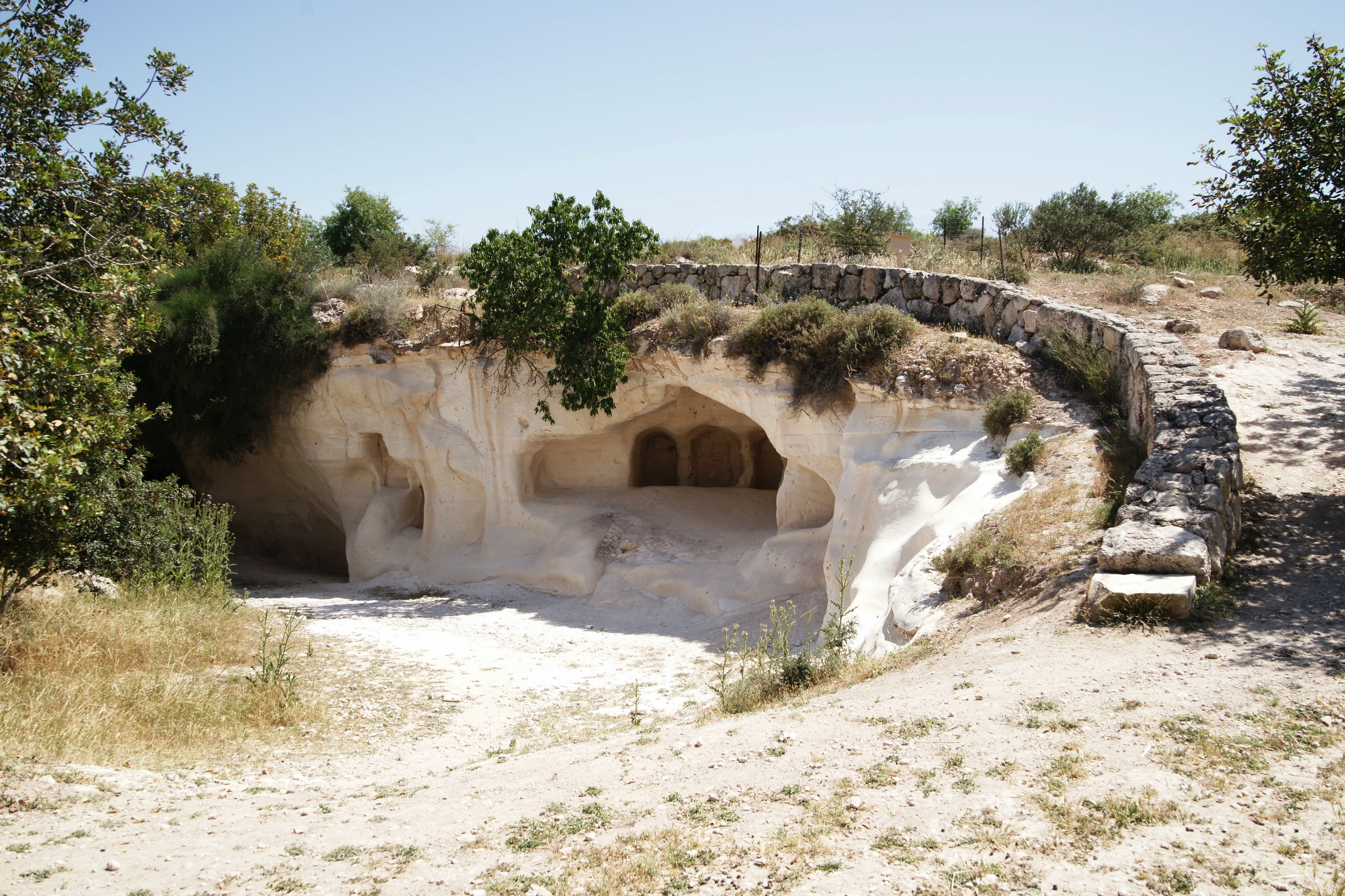 Maresha: Kokhim Cave im Northern Cemetery (Nordfriedhof)